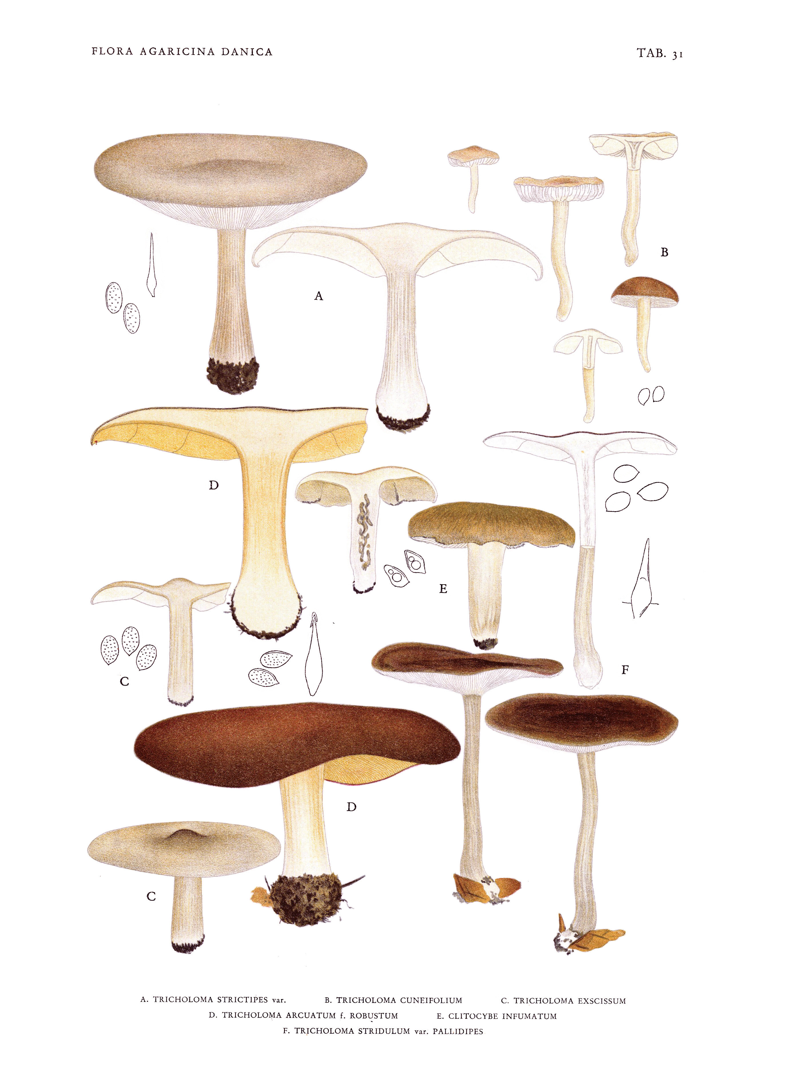 Jakob E. Lange: Flora agaricina Danica. Vol. 1; TAB. 31 A. Melanoleuca polioleuca as Tricholoma melaleucum B. Tricholoma inamoenum C. Melanoleuca grammopodia as Tricholoma grammopodium D. Melanoleuca langei as Tricholoma brevipes